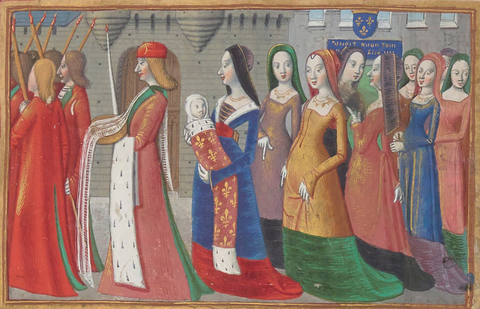 Procession baptismale de l'enfant Charles, futur Charles VII.